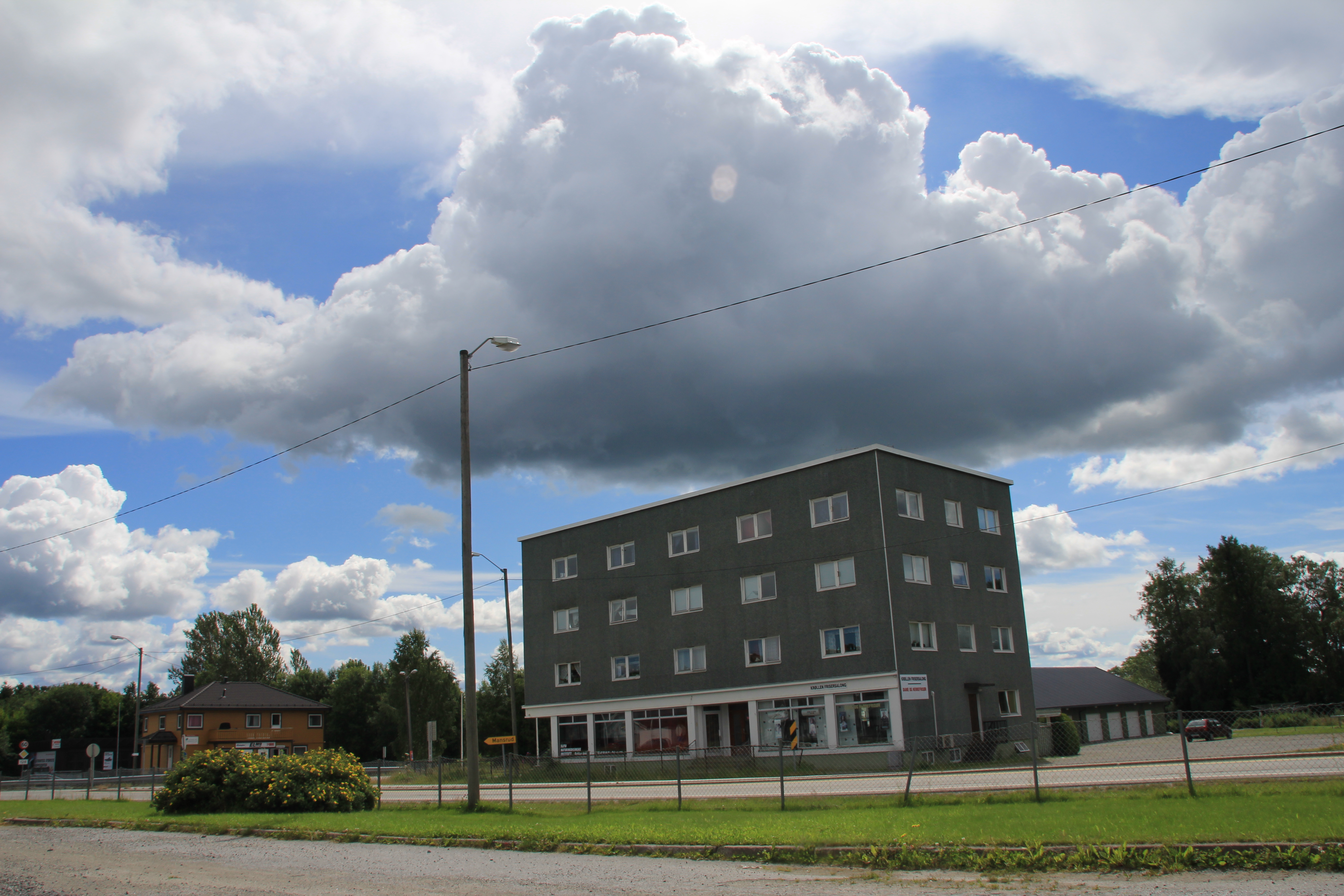 Slitu er en bygd i Eidsberg.